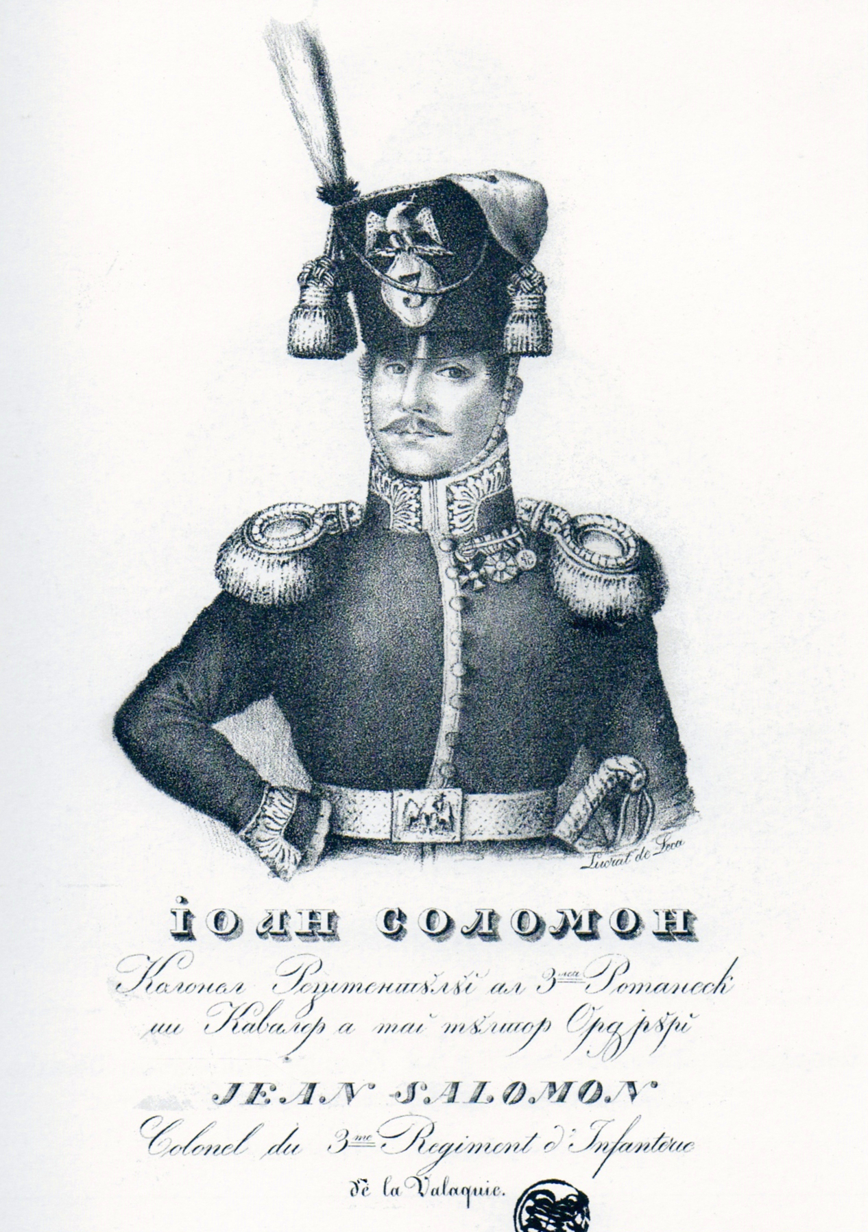 Ioan Solomon, litografie, Biblioteca Academiei Române